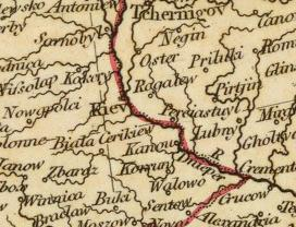 ஜான் கெர்ரி, லண்டன், 1808ம் ஆண்டு வெளியிட்ட நியூ யுனிவர்சல் அட்லஸில் கீவ். முந்தைய போலிஷ் மற்றும் இரஷ்ய அரசுகளுக்கு இடையே இரஷ்யனாக்கம் செய்யப்பட்ட கீவ்(Kiev) என்ற பெயருடன் குறிக்கப்பட்டுள்ளது.